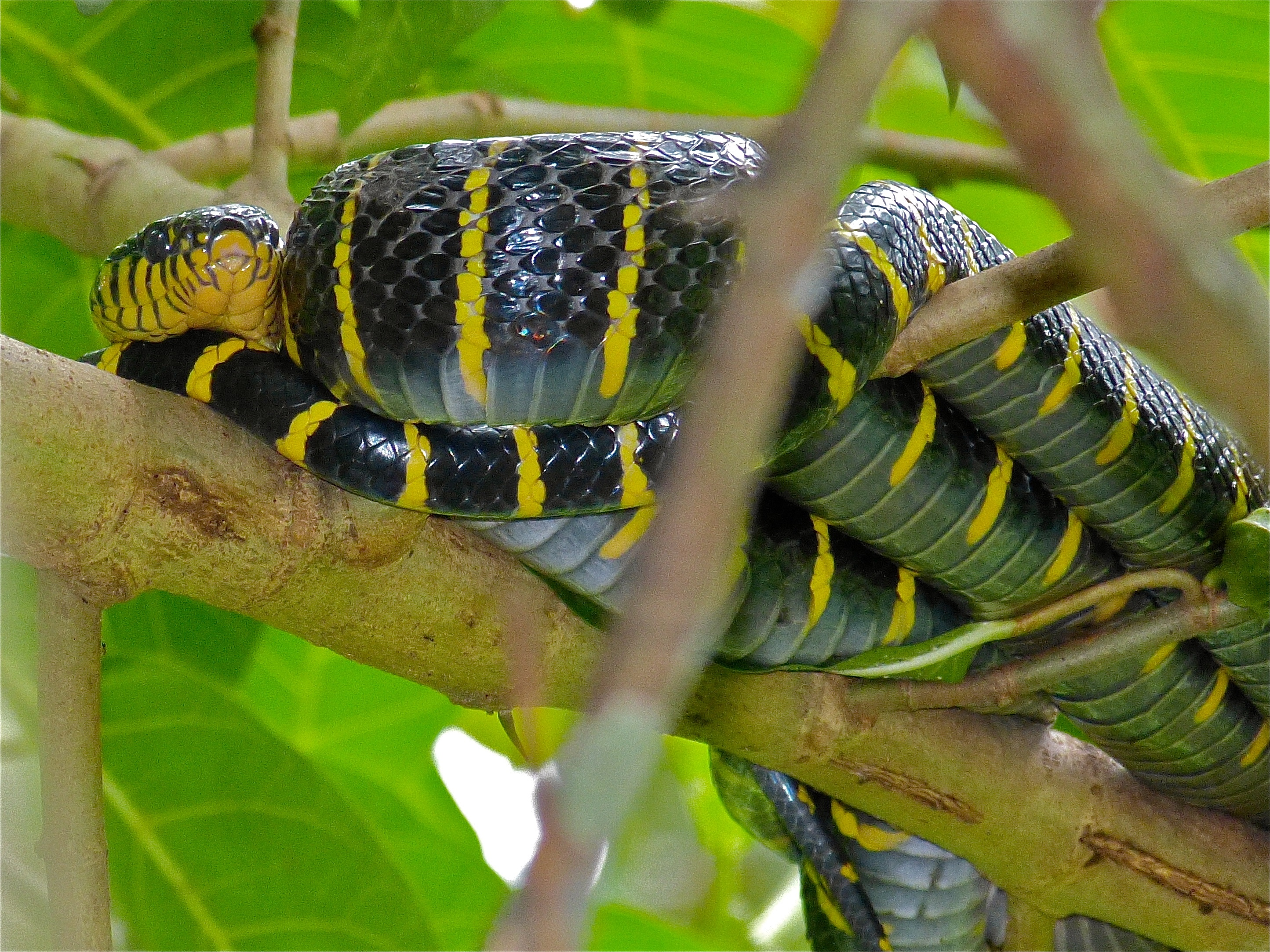 Sepilok, Sabah, MALAYSIA